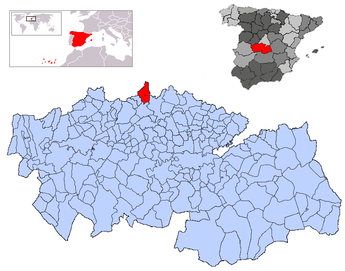 Almorox en la provincia de Toledo